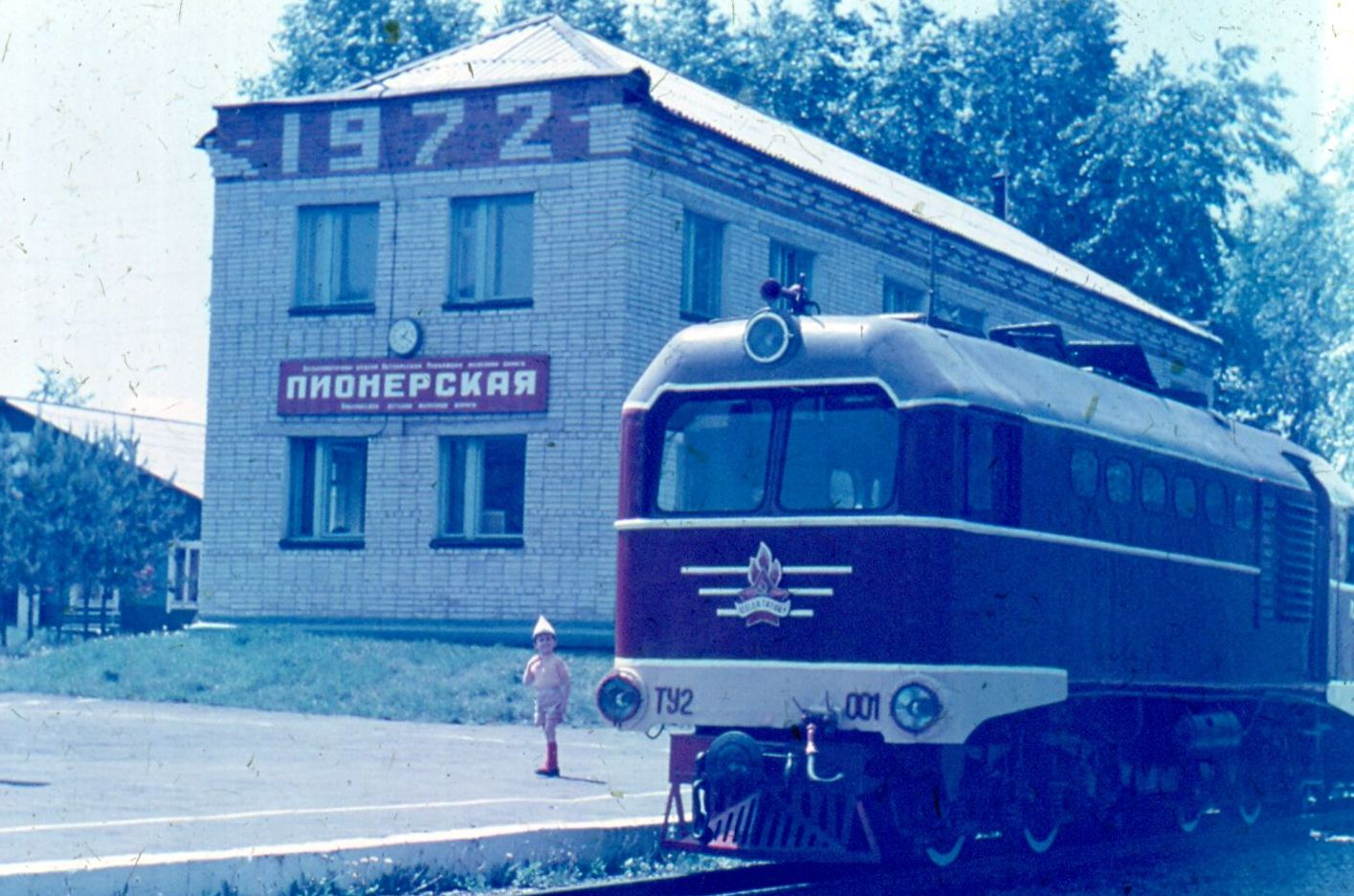 Малая Дальневосточная железная дорога, Хабаровск, 1983 год.